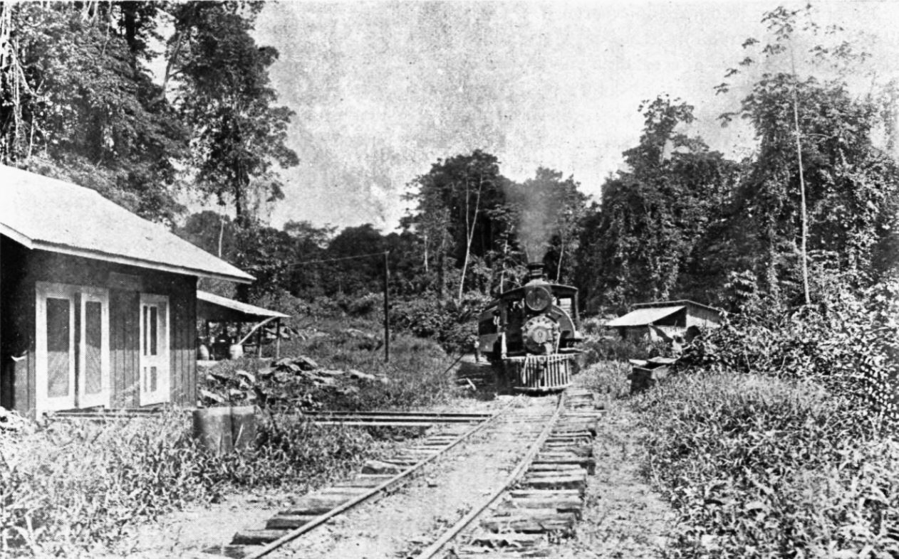 Ferrocarril del Norte de Guatemala: casita de sección.